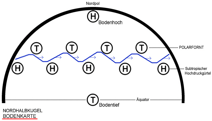 Jetsteam bodenkarte nordhalbkugel